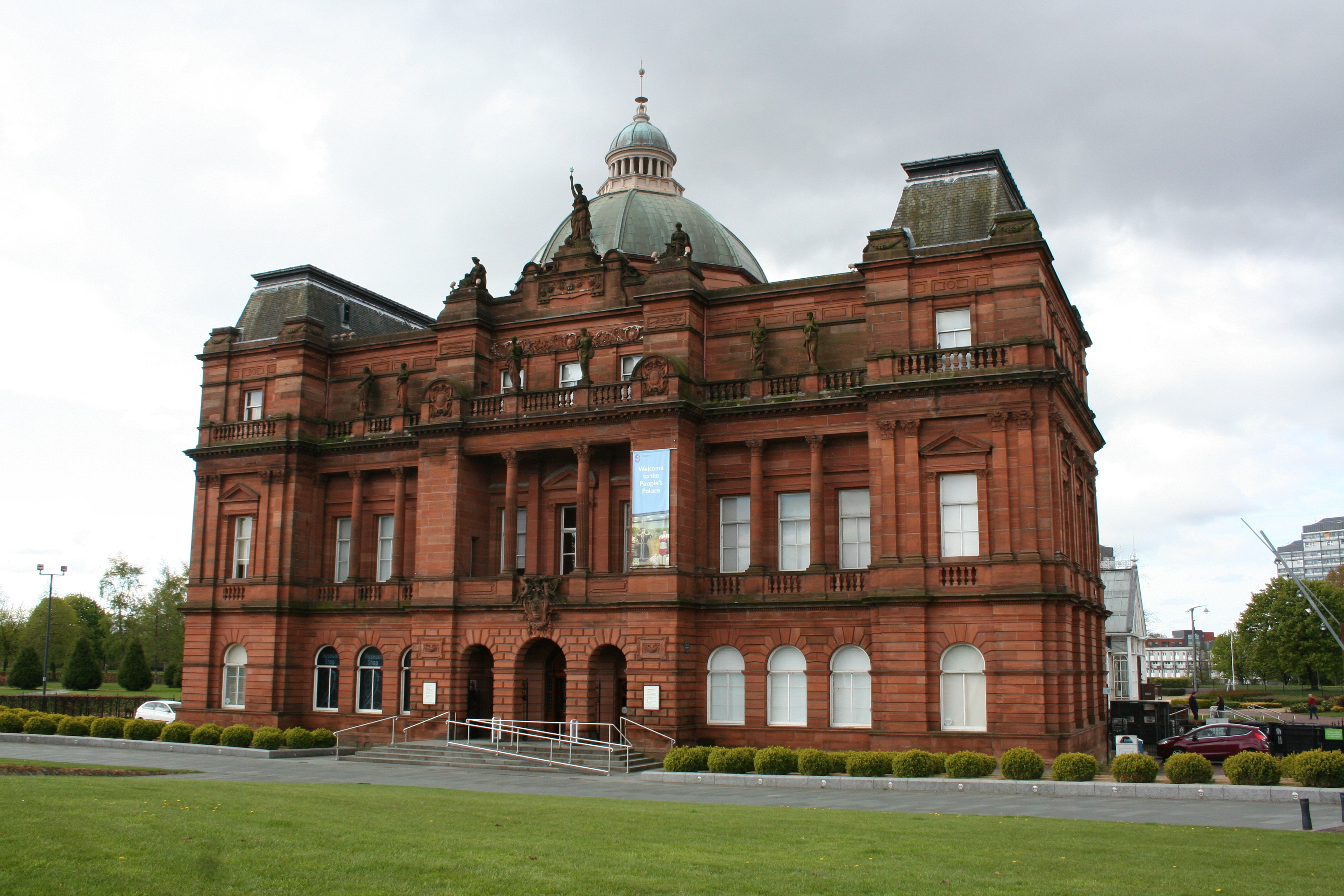 Glasgow People's Palace Museum im People's Palace & Winter Garden (1a Glasgow Green, Mehr Informationen).